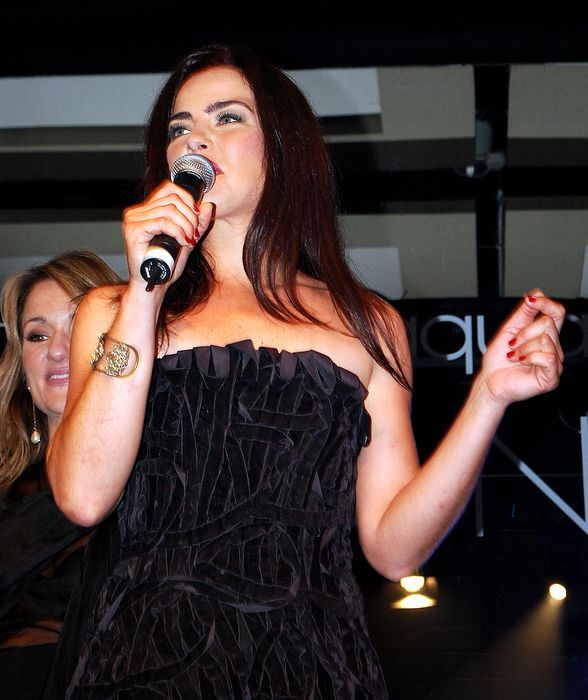 Ana Paula Arósio a un evento Avon.